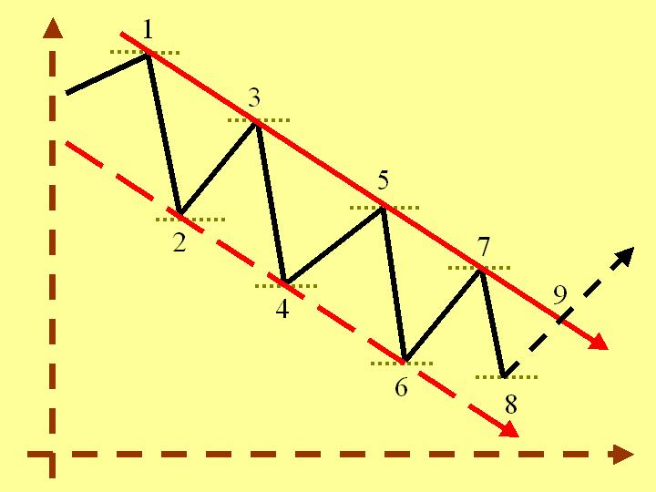 Esquema de canal a la baja